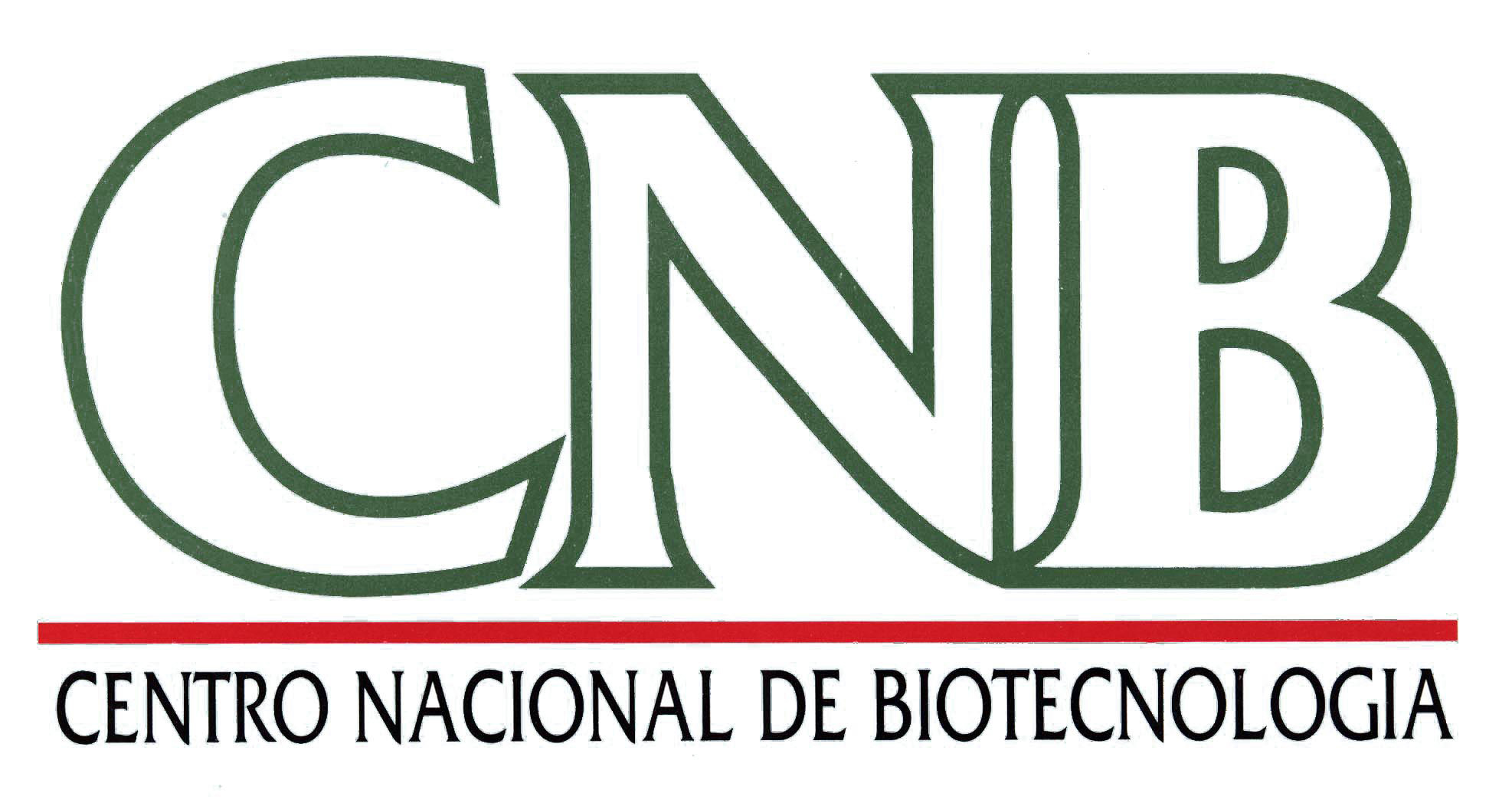 Logotipo del CNB